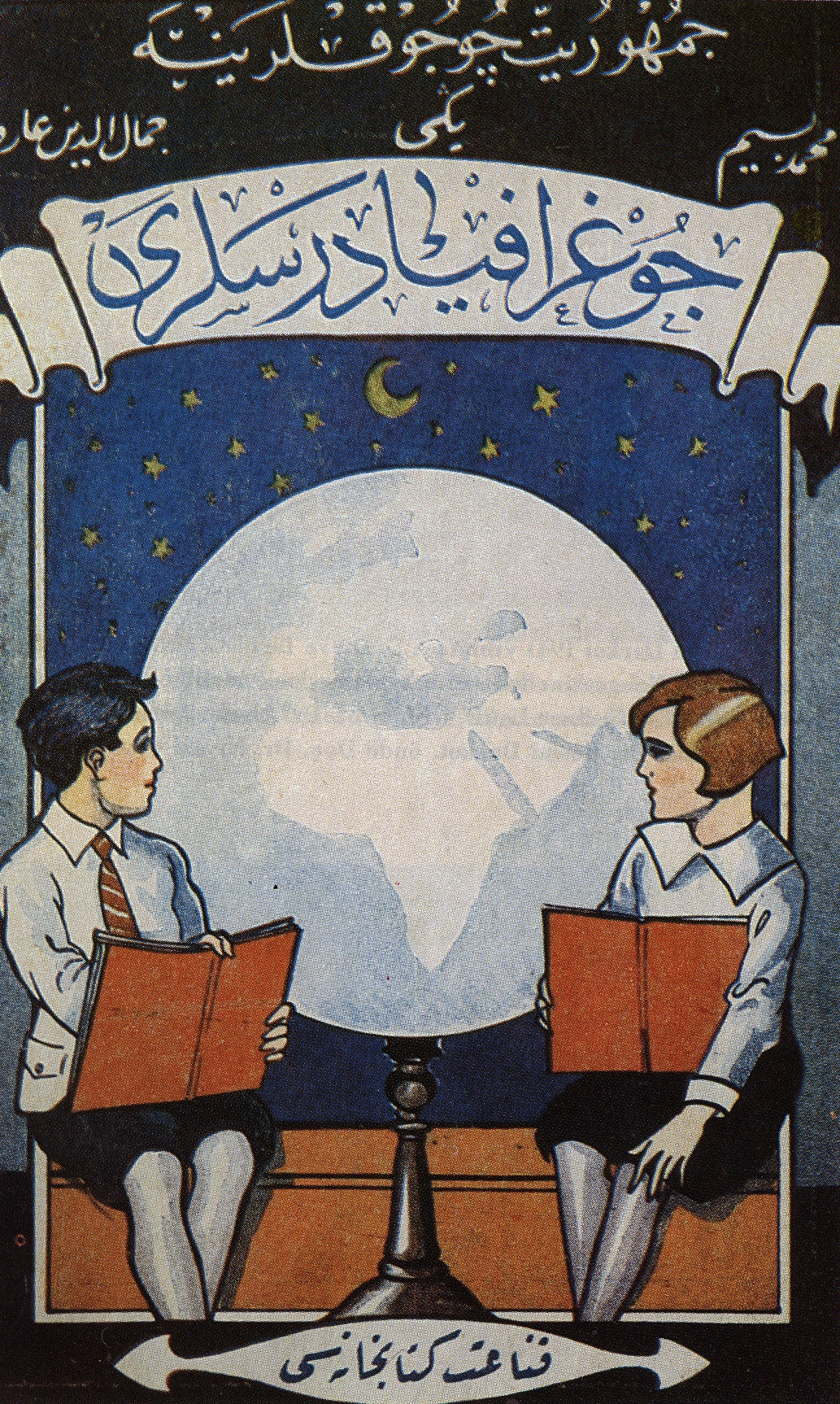 İlk Mekteplerde Coğrafya Muallim Kitabı kapağı, 1925